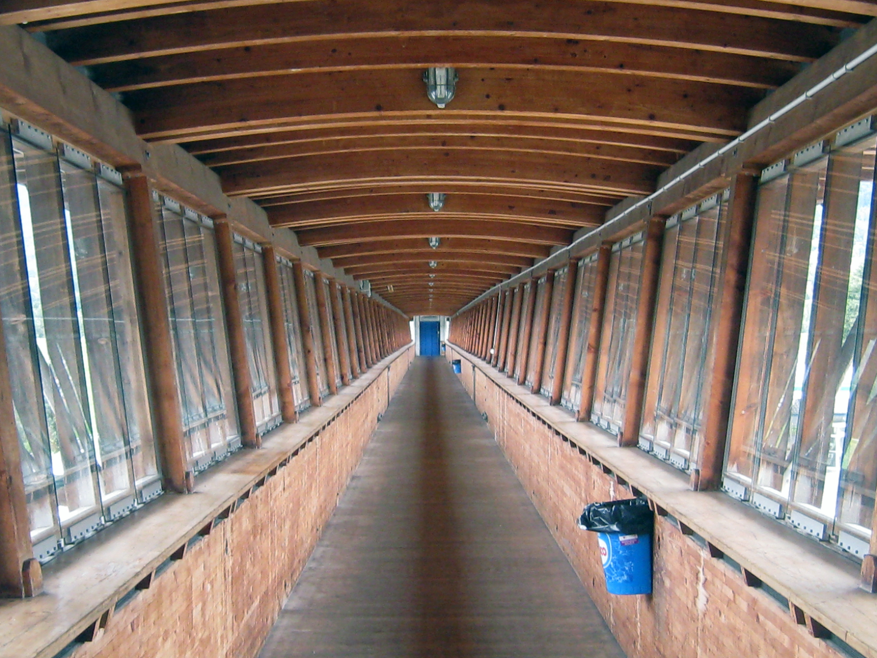 Fussgängerbrücke Autobahnraststätte Rheintal